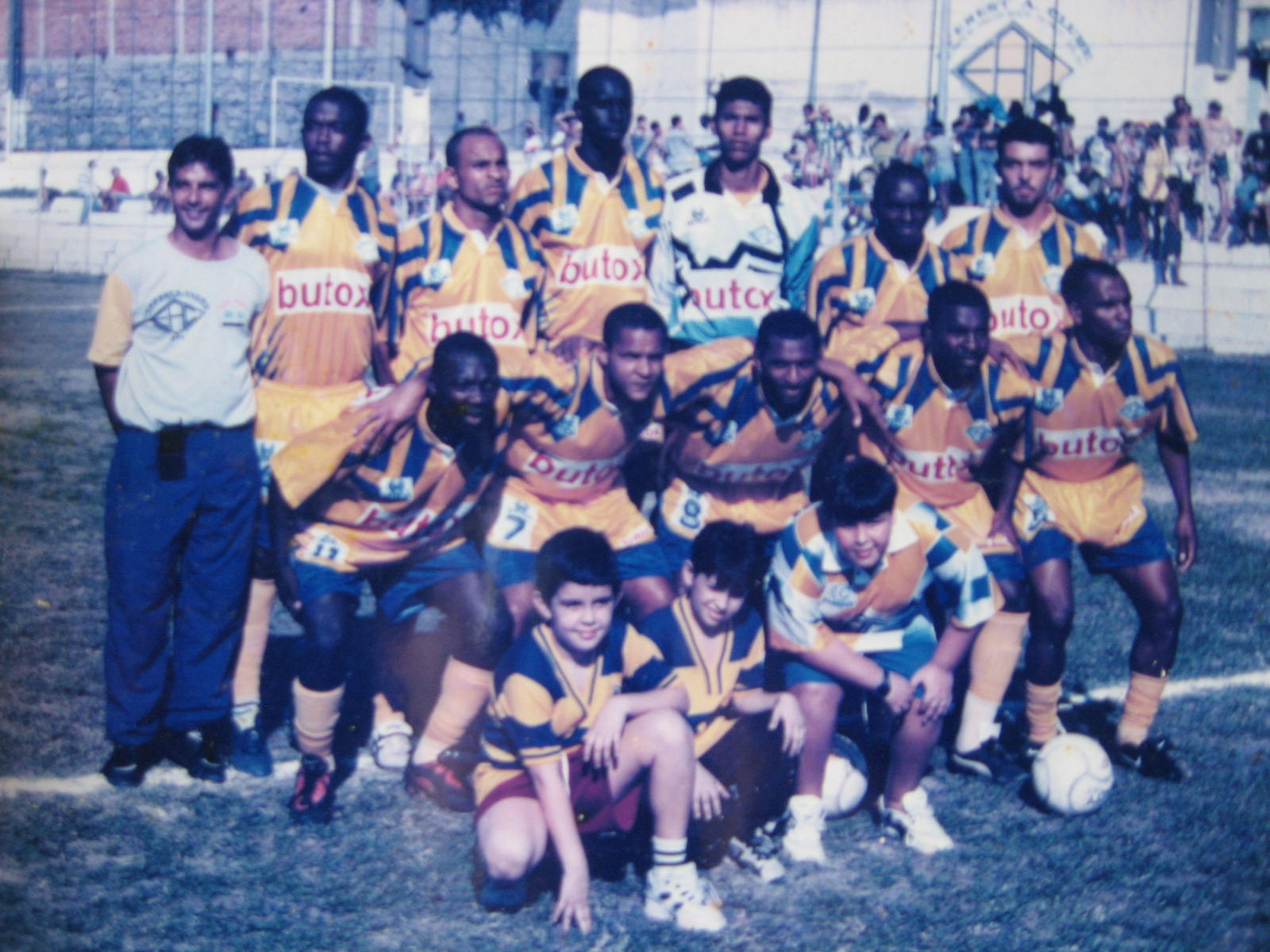 Equipe profissional do Everest AC vice-campeão da Terceira Divisão de 1999.